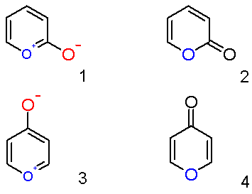 Pyrones